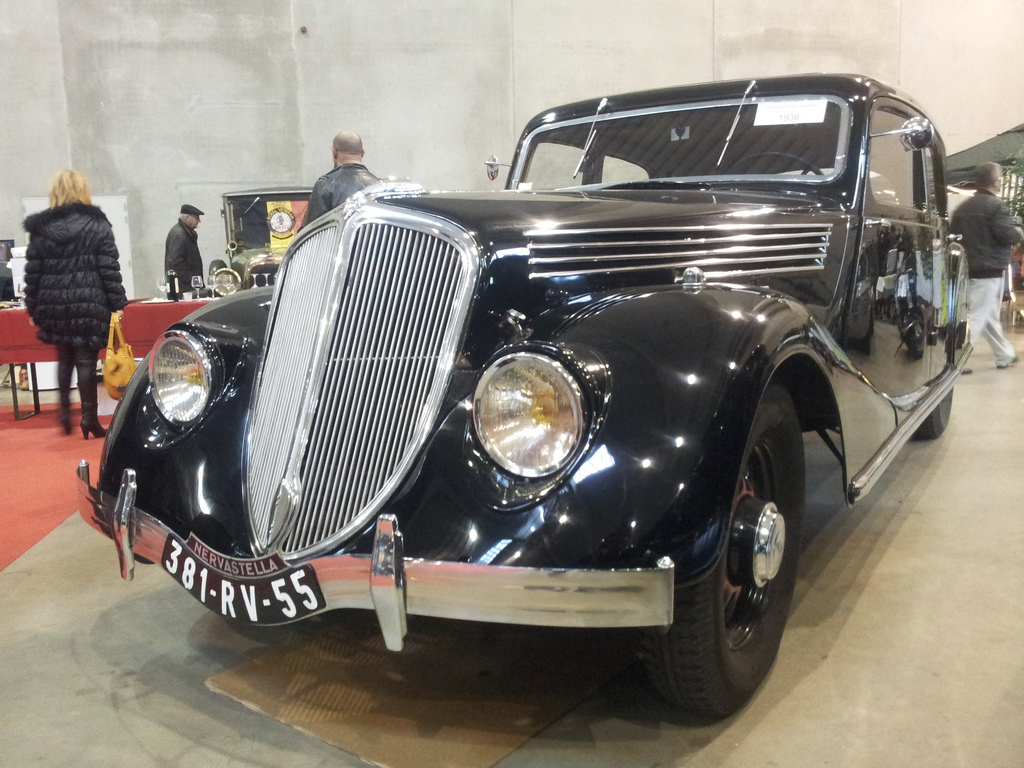 1936 - Nervastella